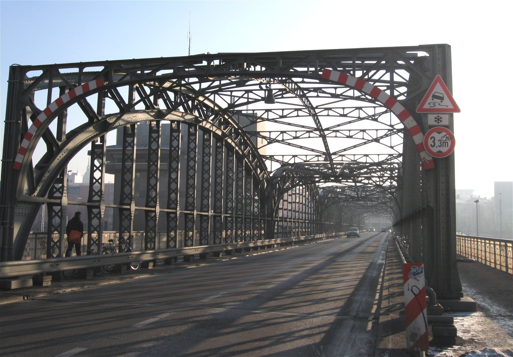 Hackerbrücke in München, Blick nach Osten